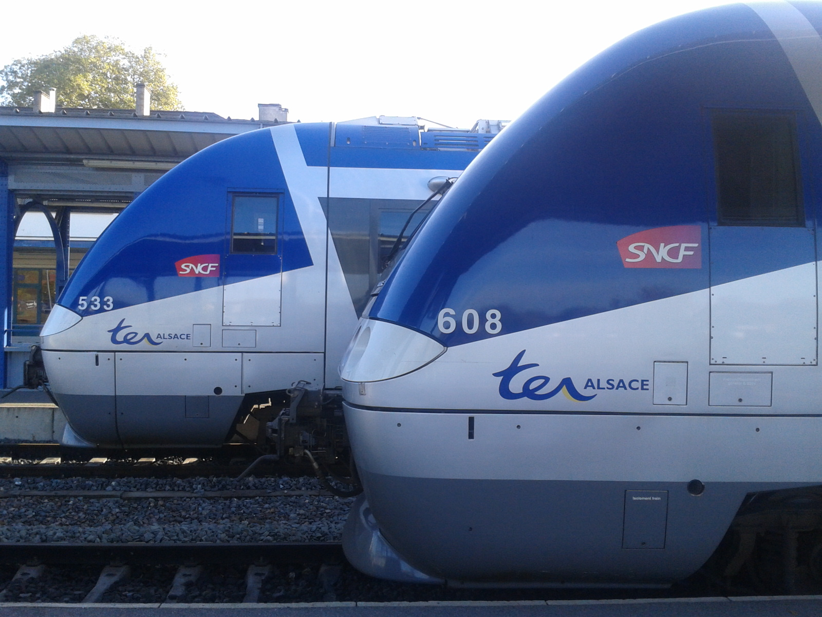 Deux rames XGC (X 76500) en gare de Haguenau, le 18 octobre 2013.